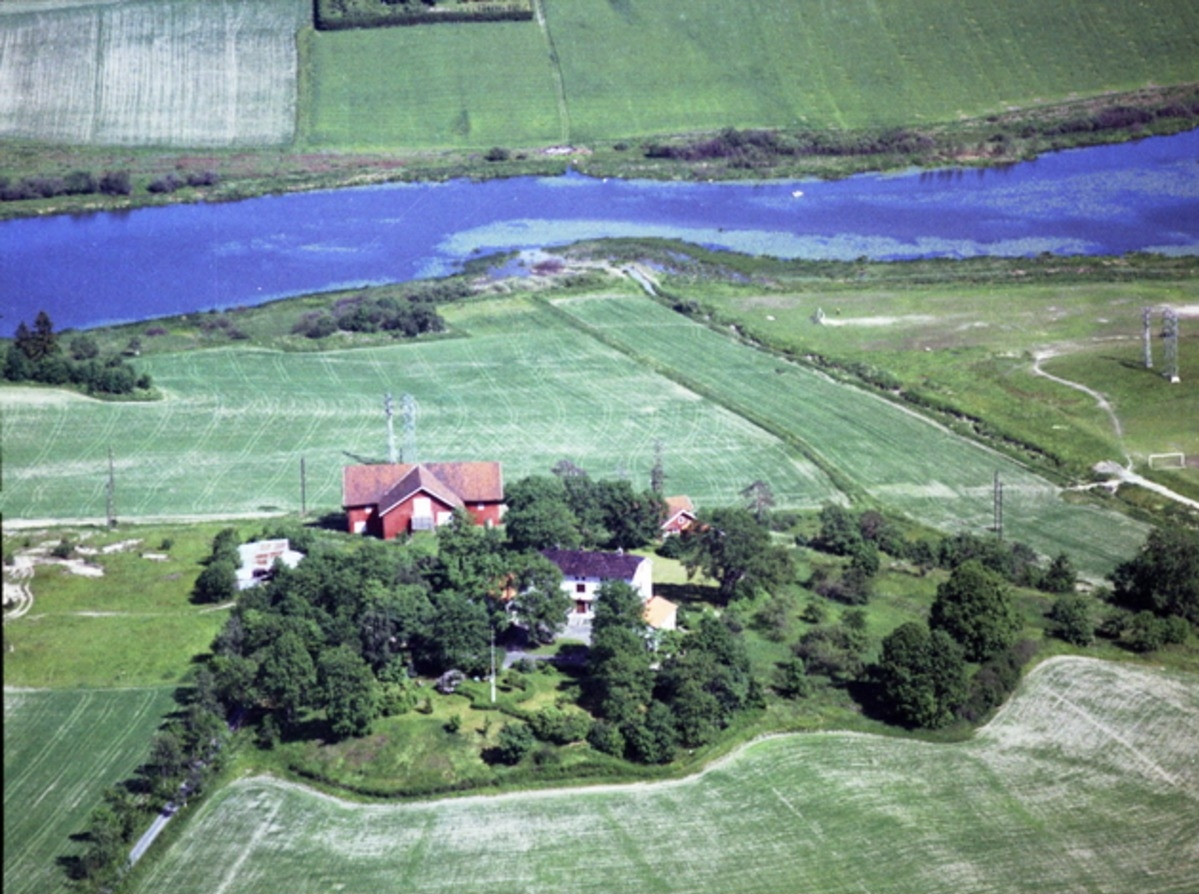 Abildsø gård med Østensjøvannet i bakgrunnen, 1962